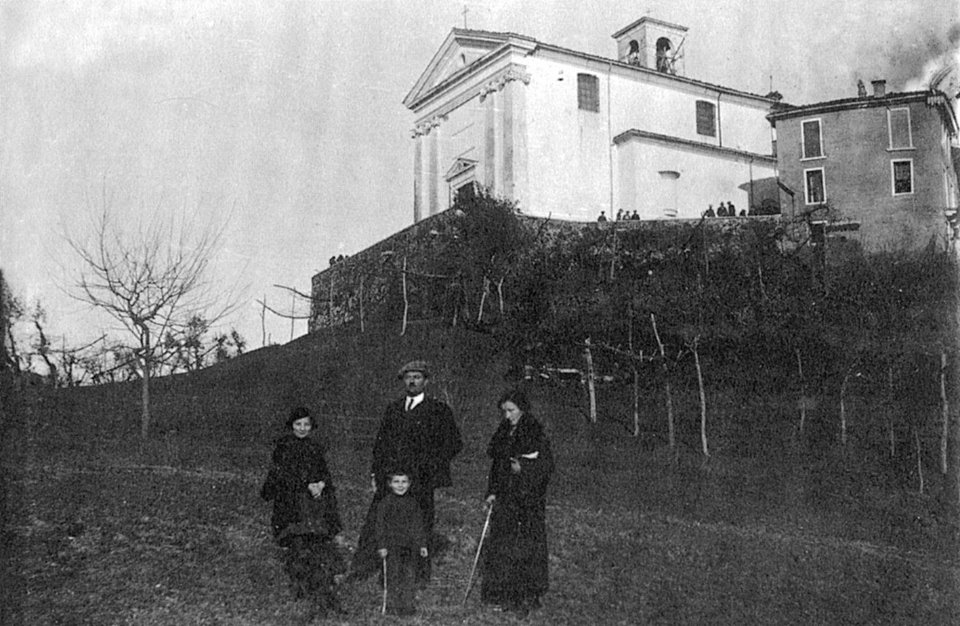 Muzzolon_primi '900